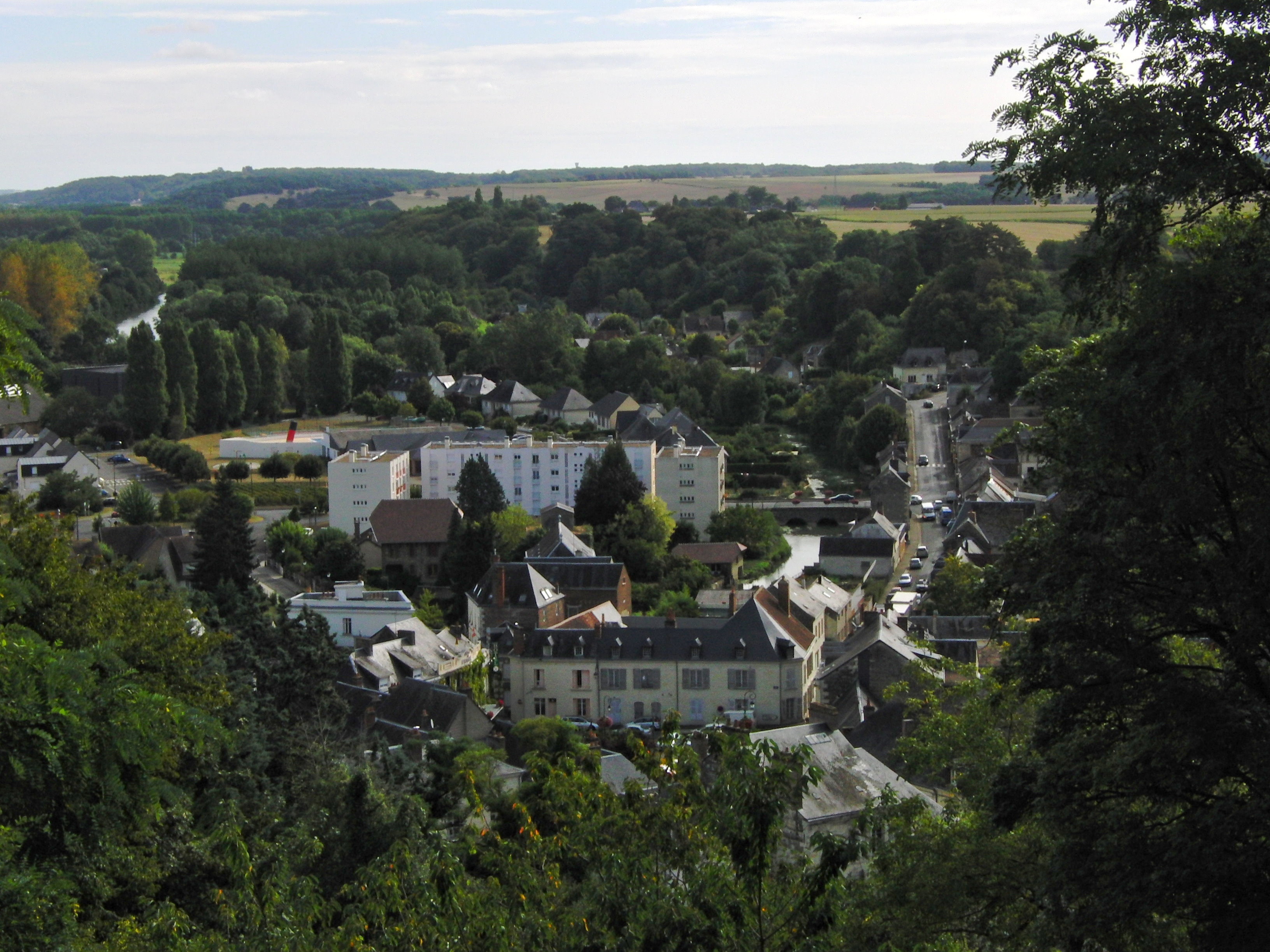 Vue de La Chartre-sur-le-Loir, Sarthe, France